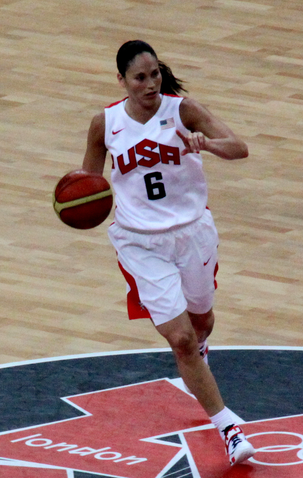 Sue Bird